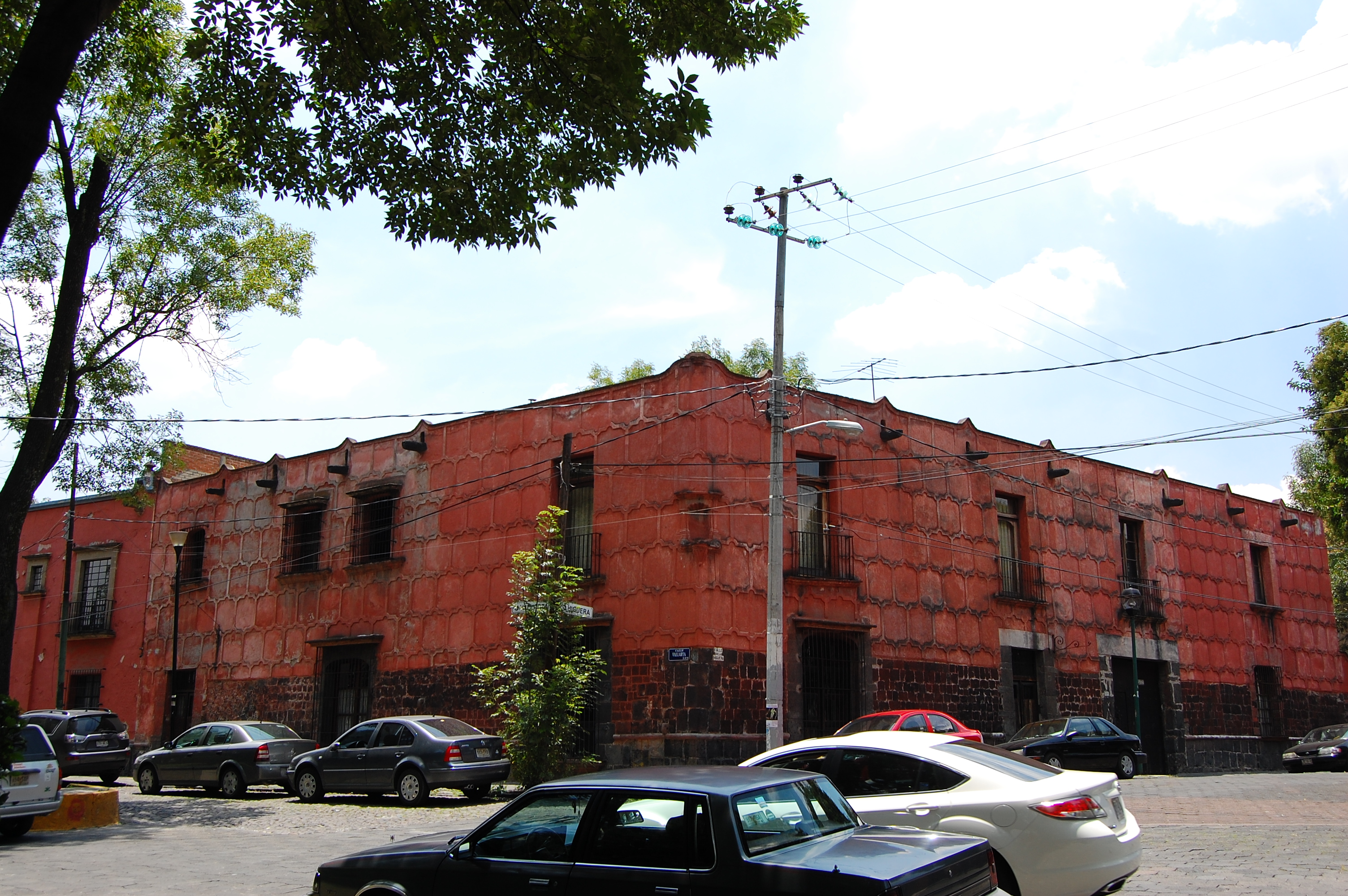 casa de la malinche vista desde el jardin de la conchita